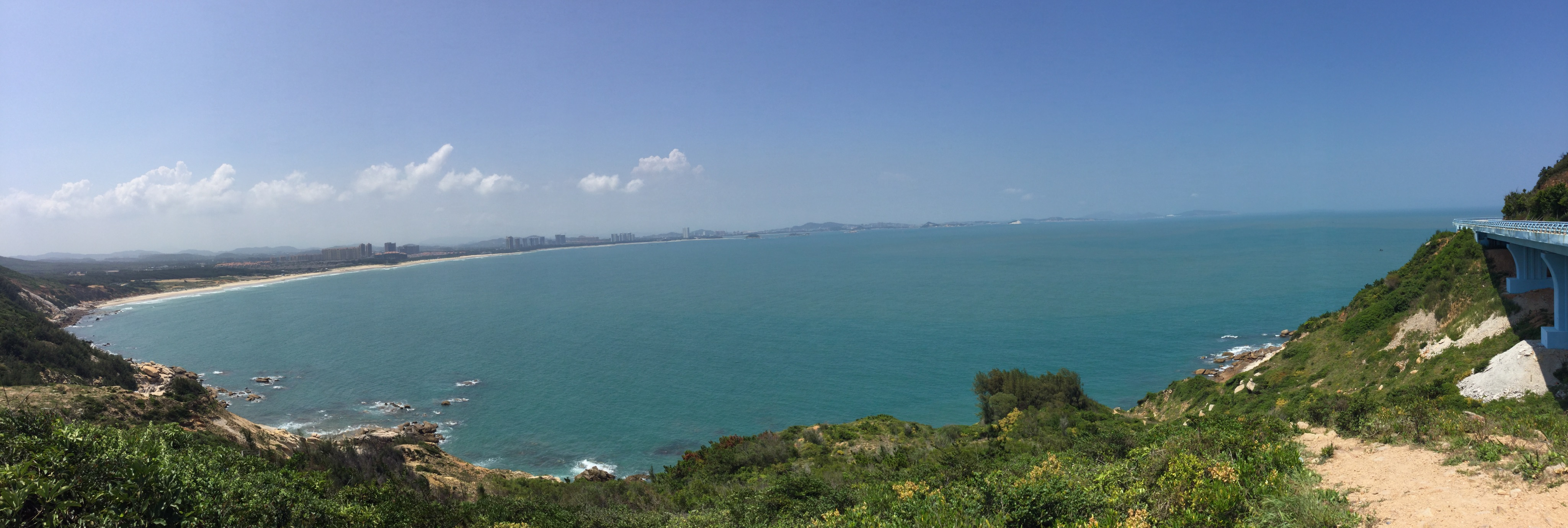 苏峰山上的海滩全景